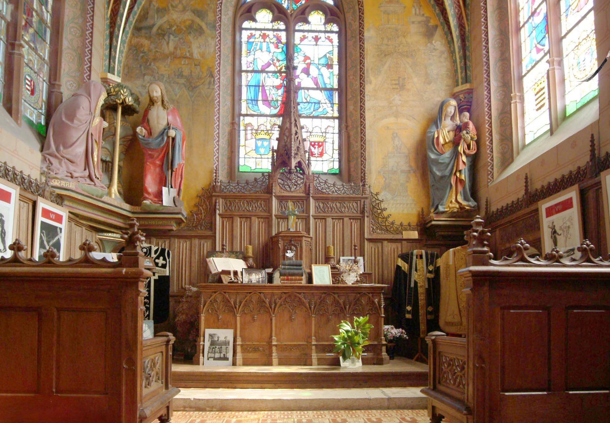 Intérieur de la chapelle du château d'Etelan